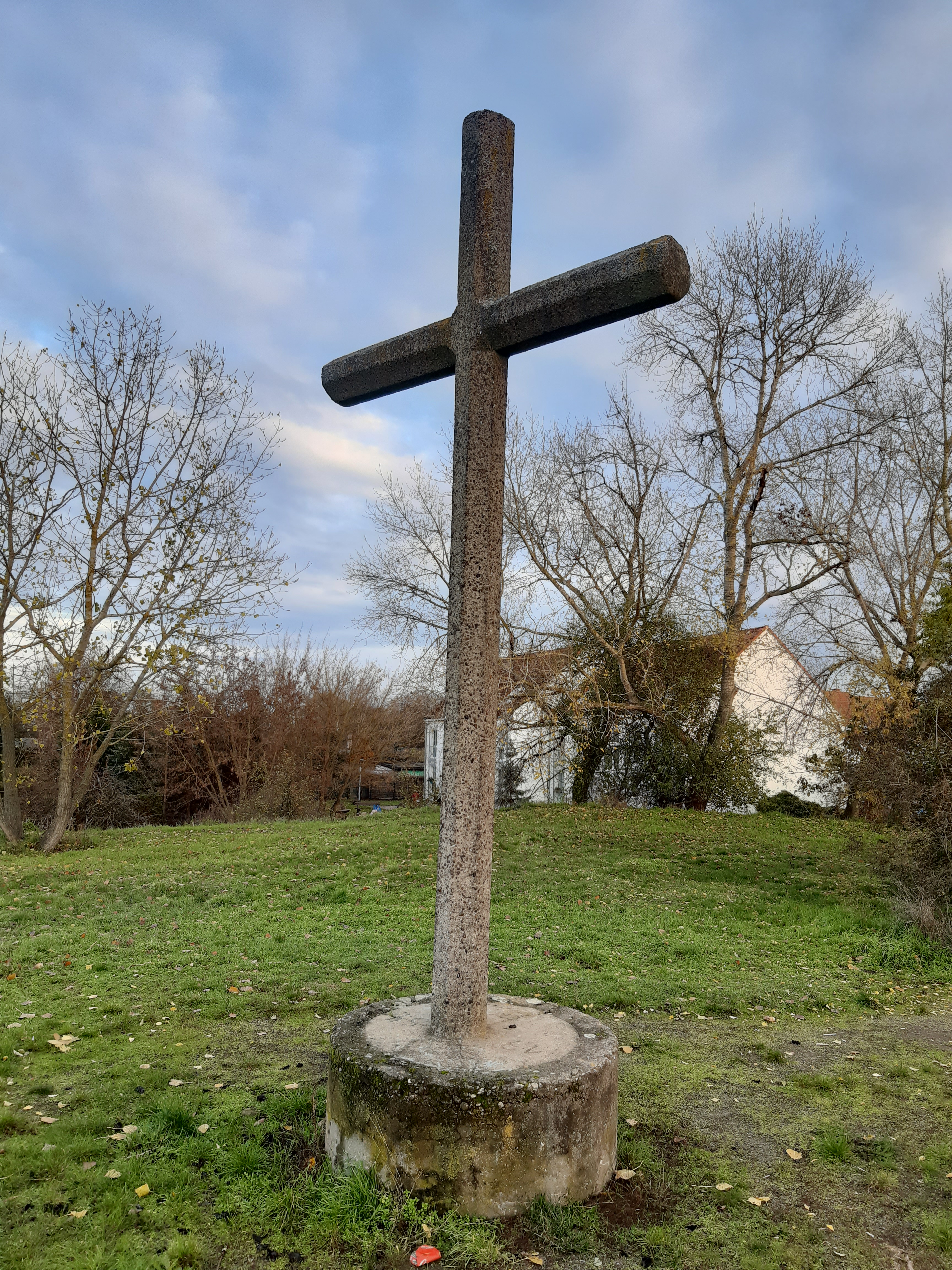 Inschrifttafel